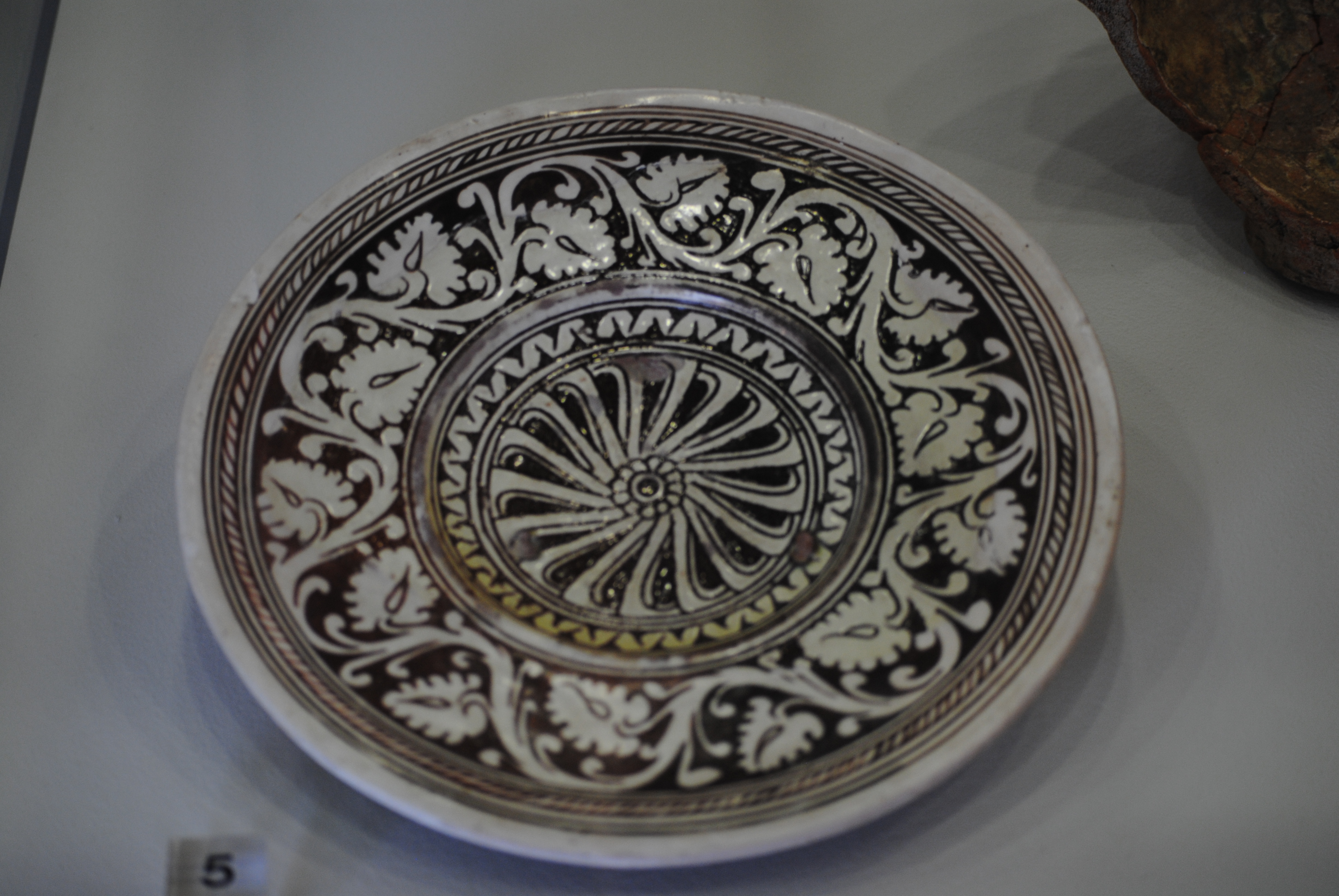 Piatto ingobbiato e graffito a fondo ribassato (scarto di cottura), prodotto nella seconda metà del XVI secolo (collezione Tongiorgi, Pisa) - Museo nazionale di San Matteo.